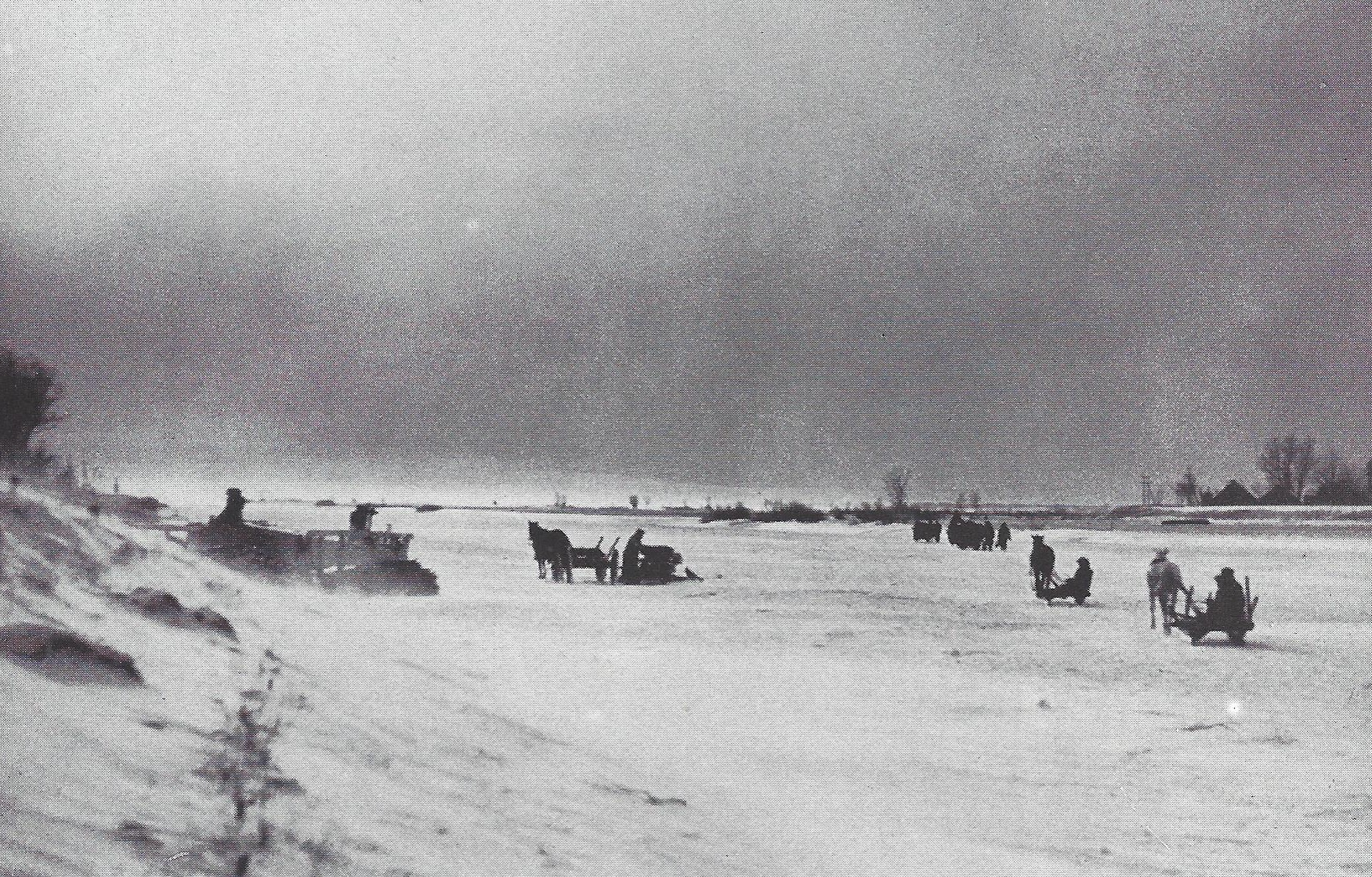 Zugefrorener Skirwieth-Strom in Preußisch Litauen.